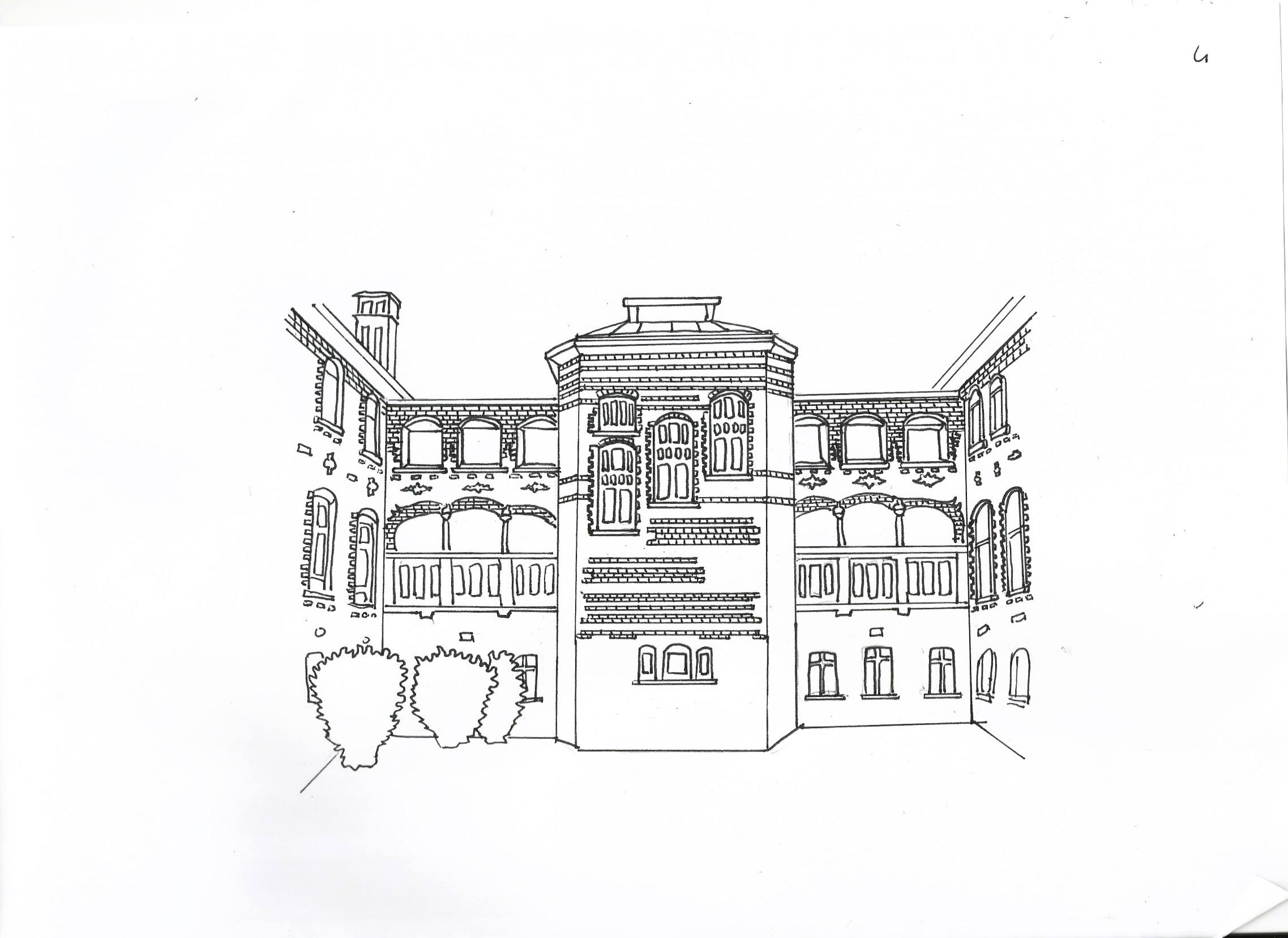 Dessin de l'hôpital Brugmann